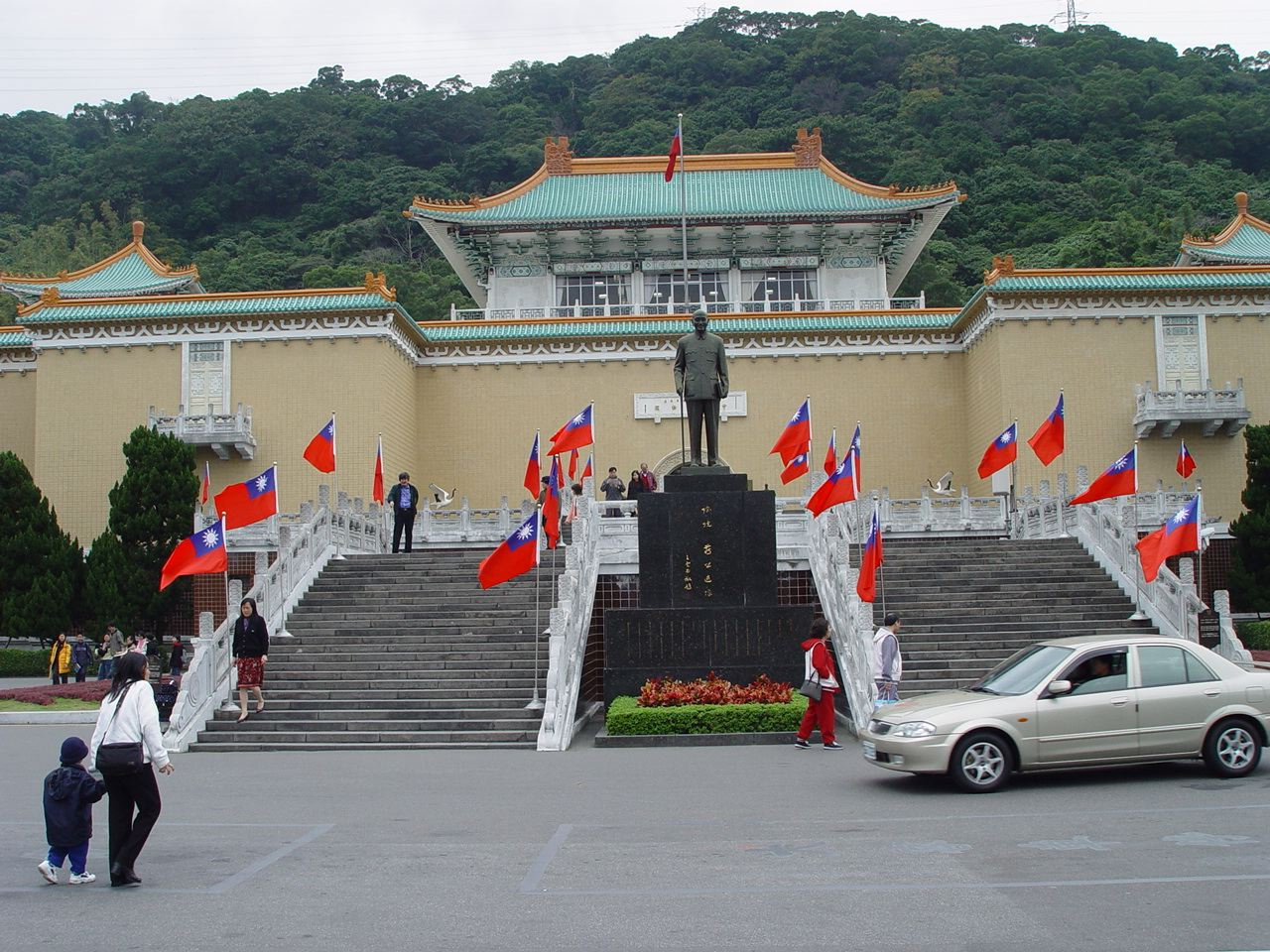 國立故宮博物院正門前，設置中華民國國旗與蔣中正站像。